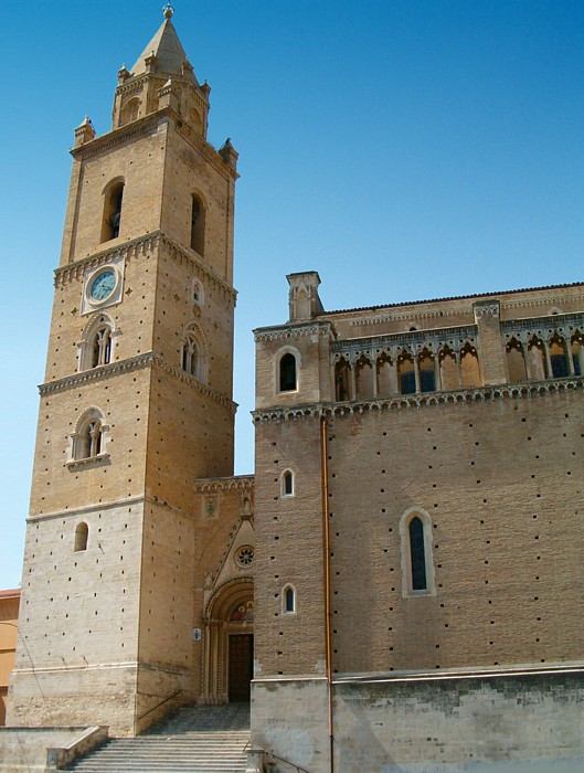 Chieti: Cathedraal van San Giustino